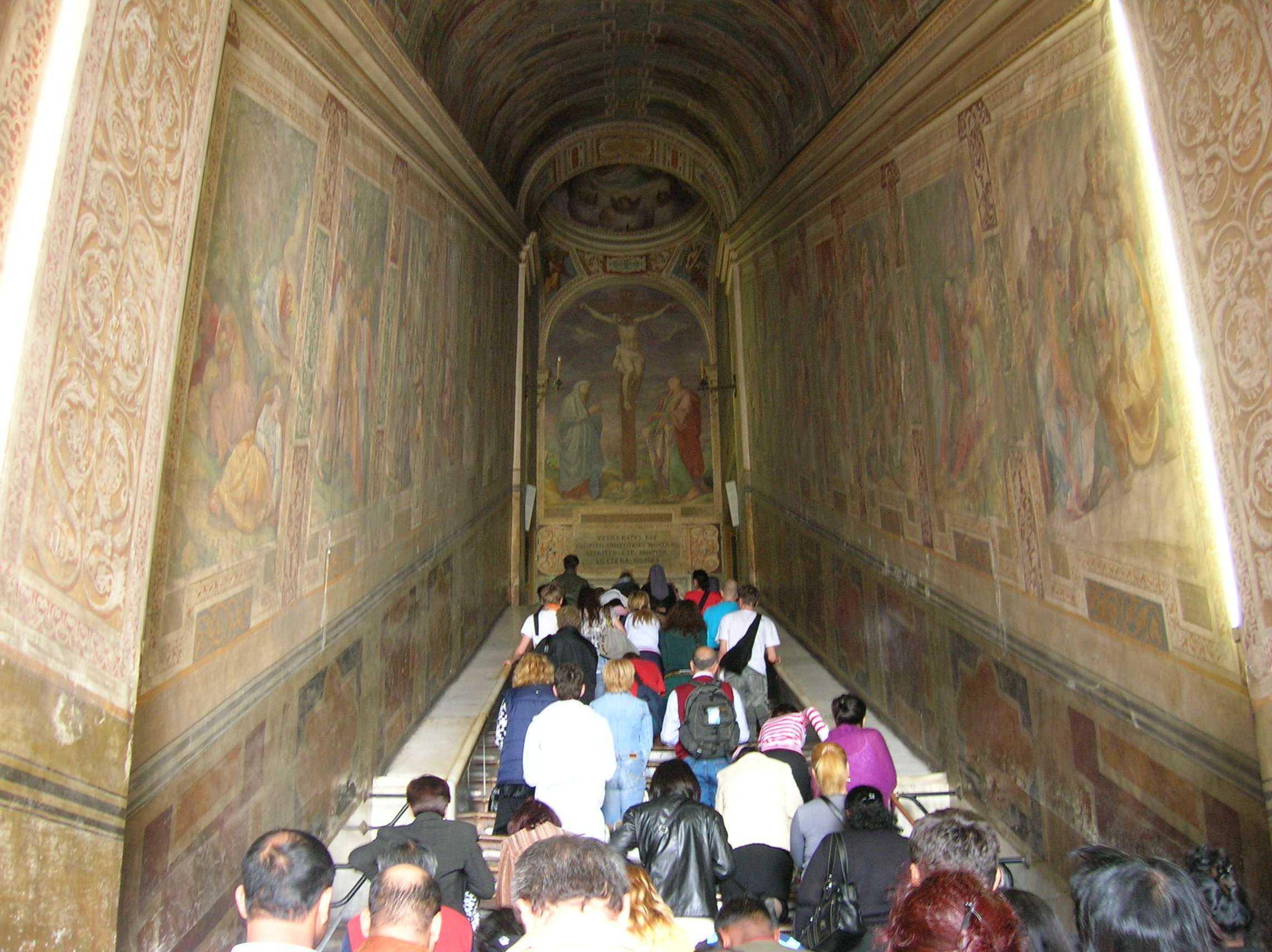 La Scala Santa (l'escalier saint)